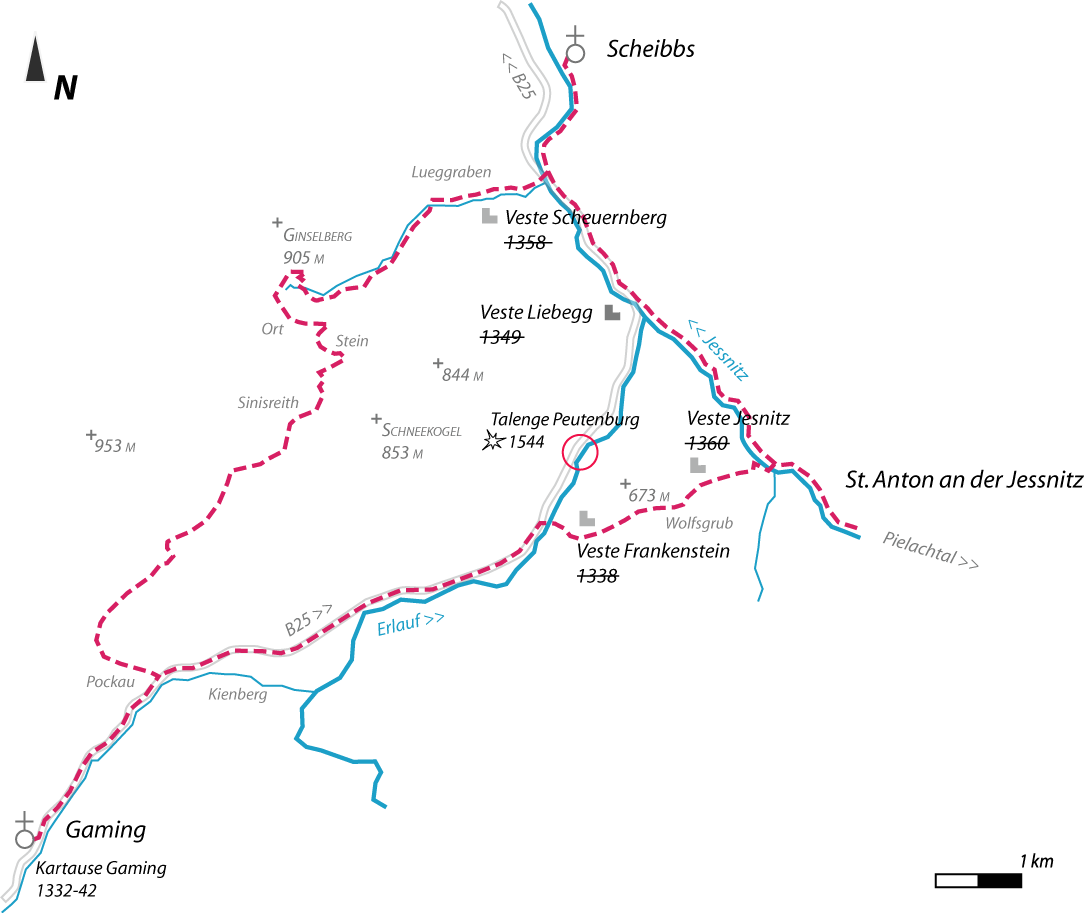 sb karte alter weg